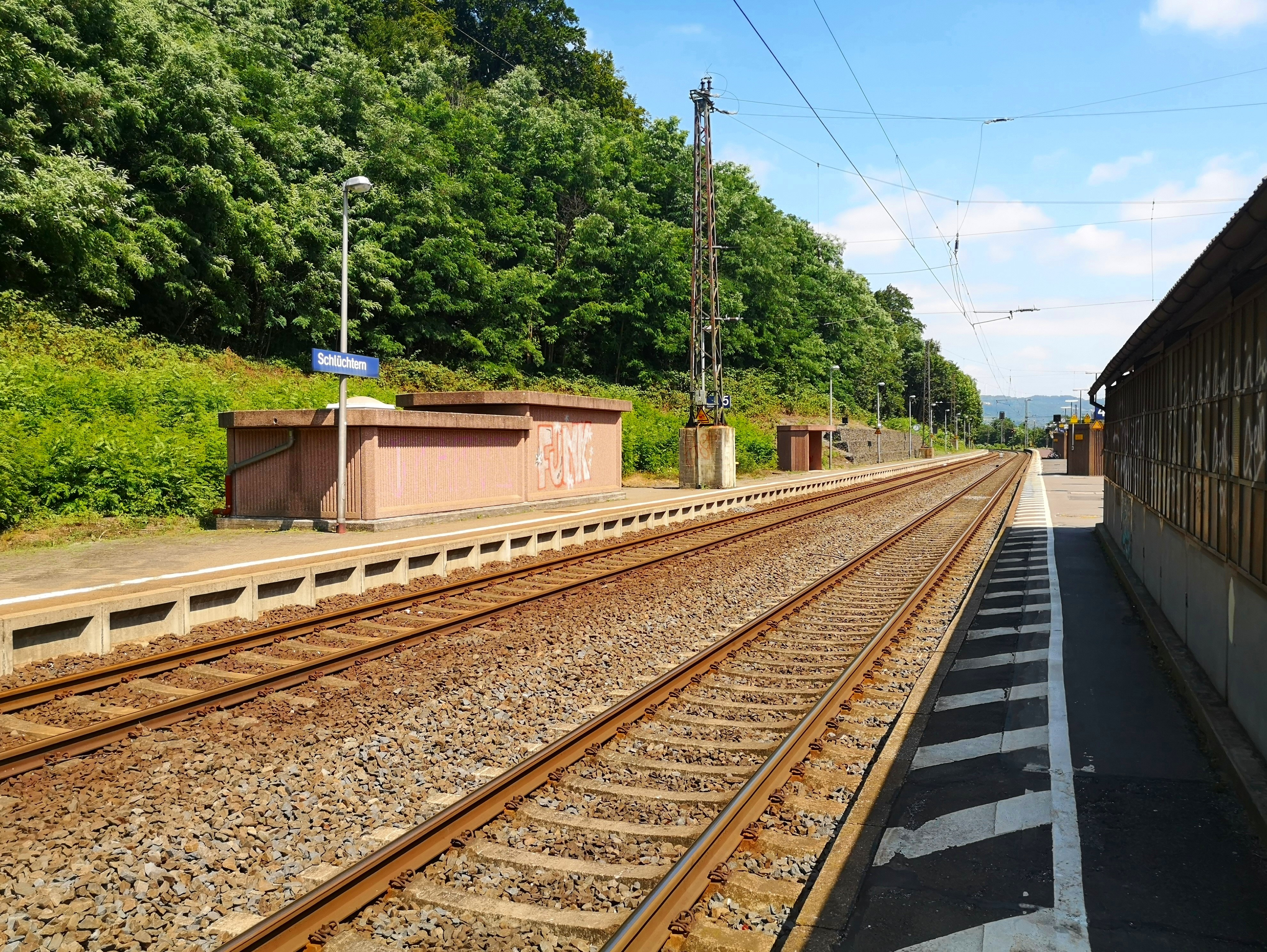 Bahnhof Schlüchtern Bahnsteig